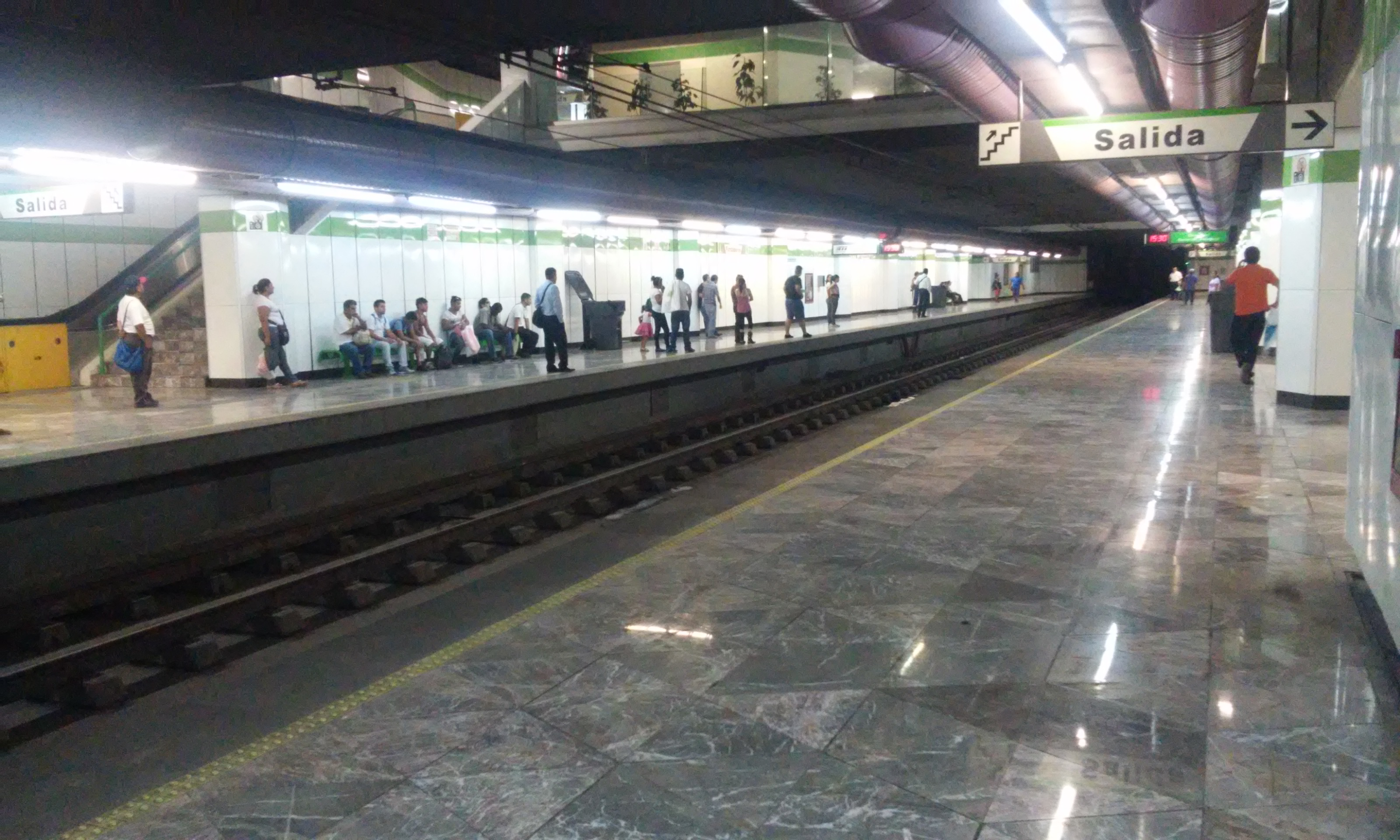 Interior de la estación